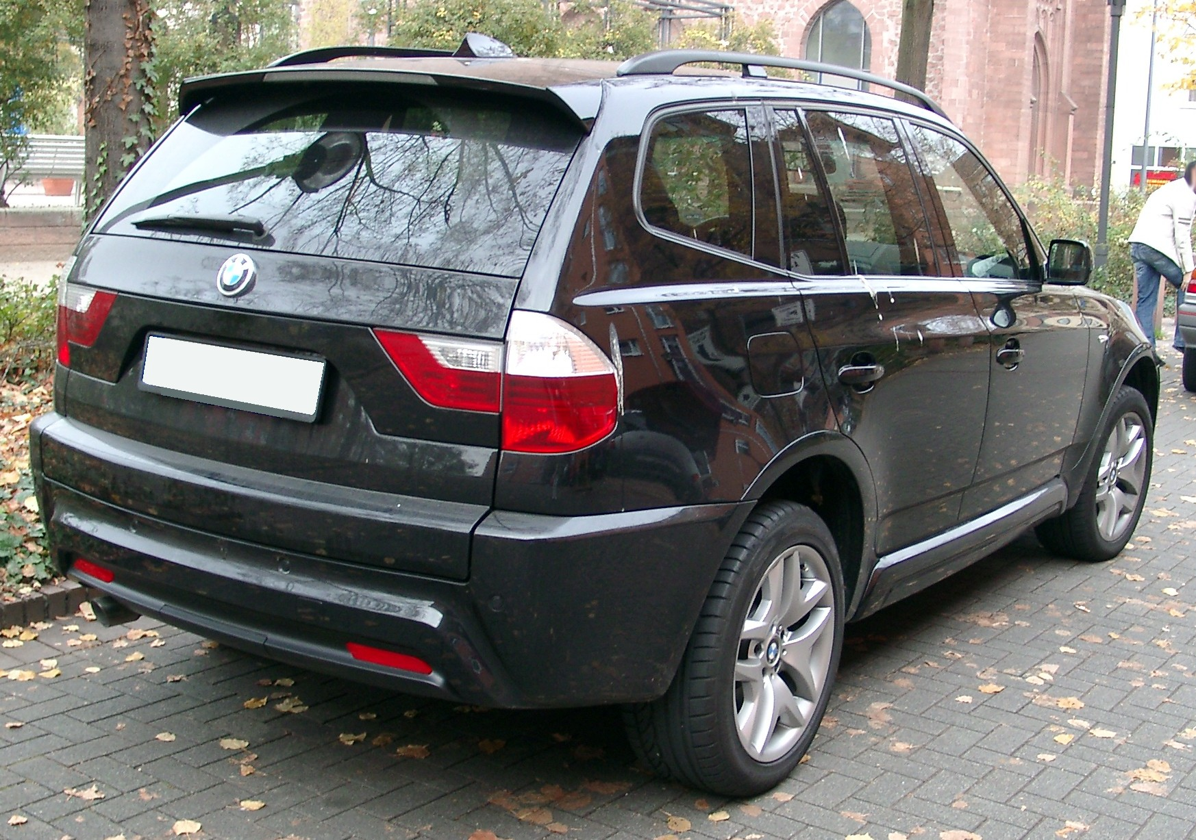 BMW X3